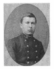 French telegraph engineer Léon Charles Thévenin (1857-1926)